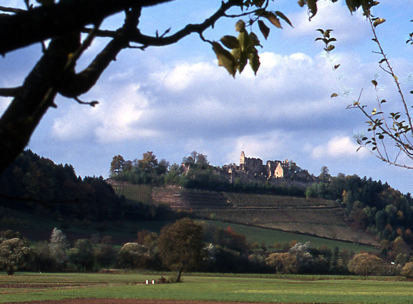 Deutschland, Baden-Württemberg, Emmendingen, Hochburg